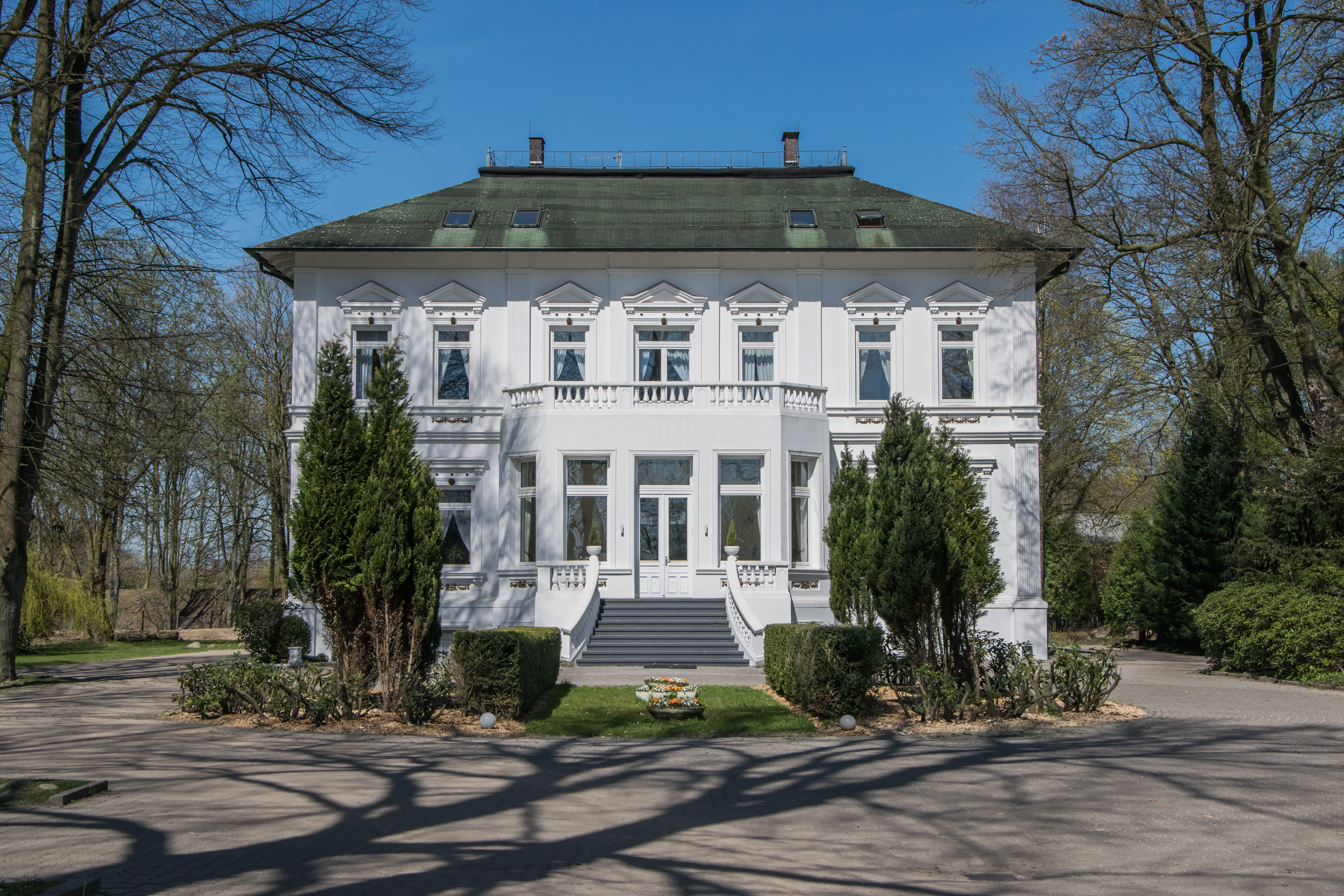 Herrenhaus Höltigbaum im Frühjahr